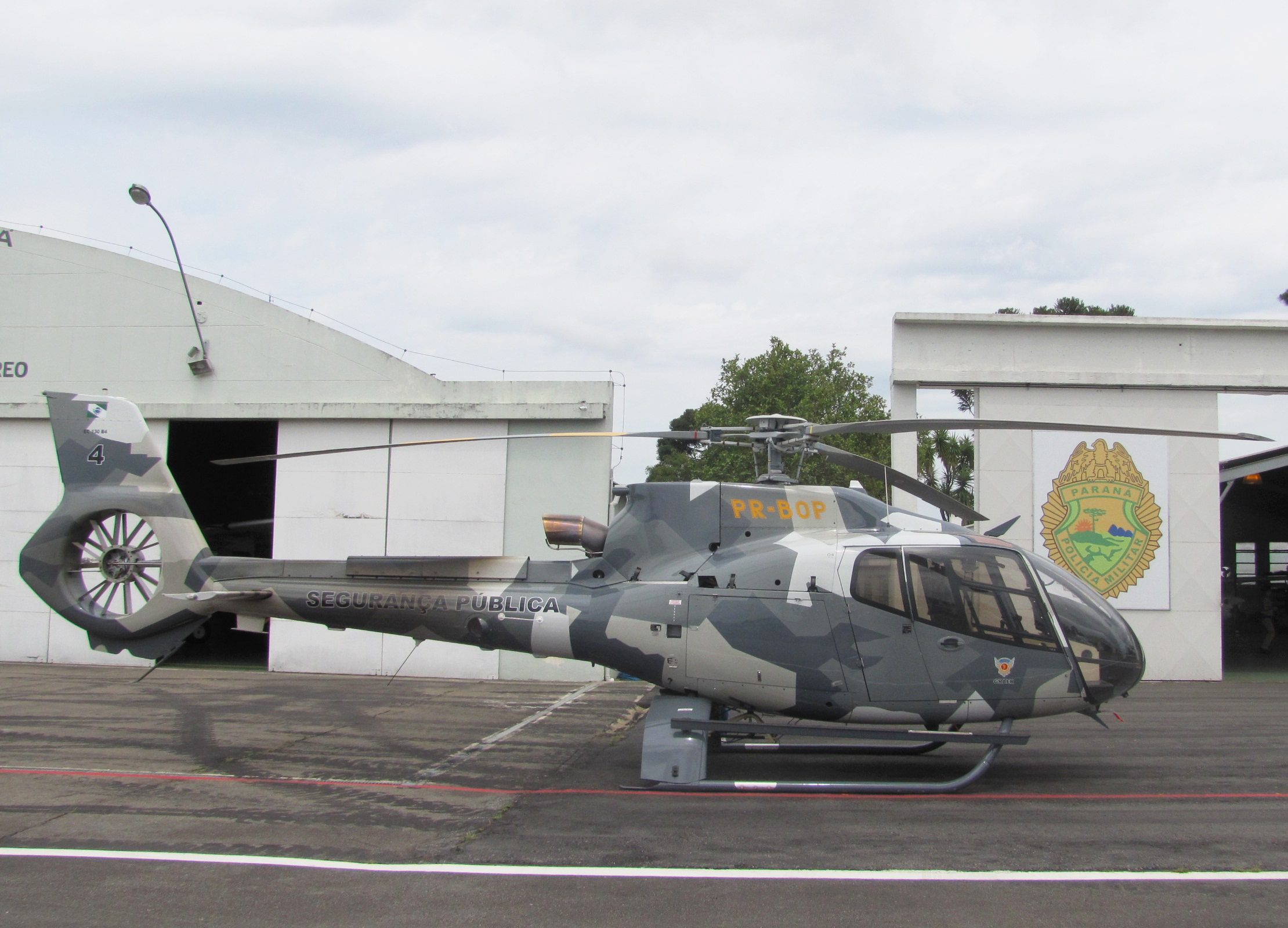 Helicóptero do GRAER, Paraná.